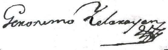 Firma en su testamento.